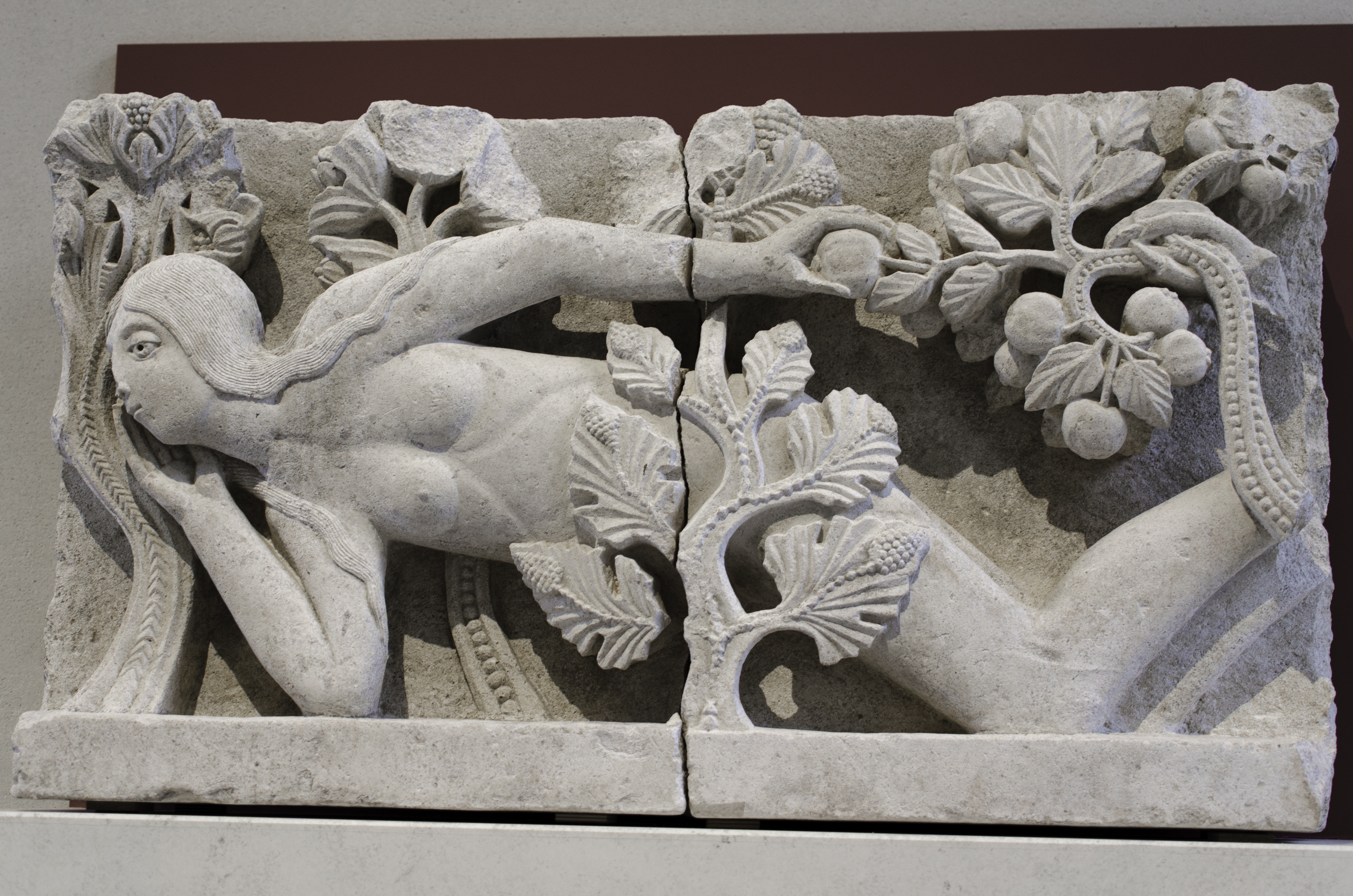 Vue de droite de la tentation d'Ève restaurée.